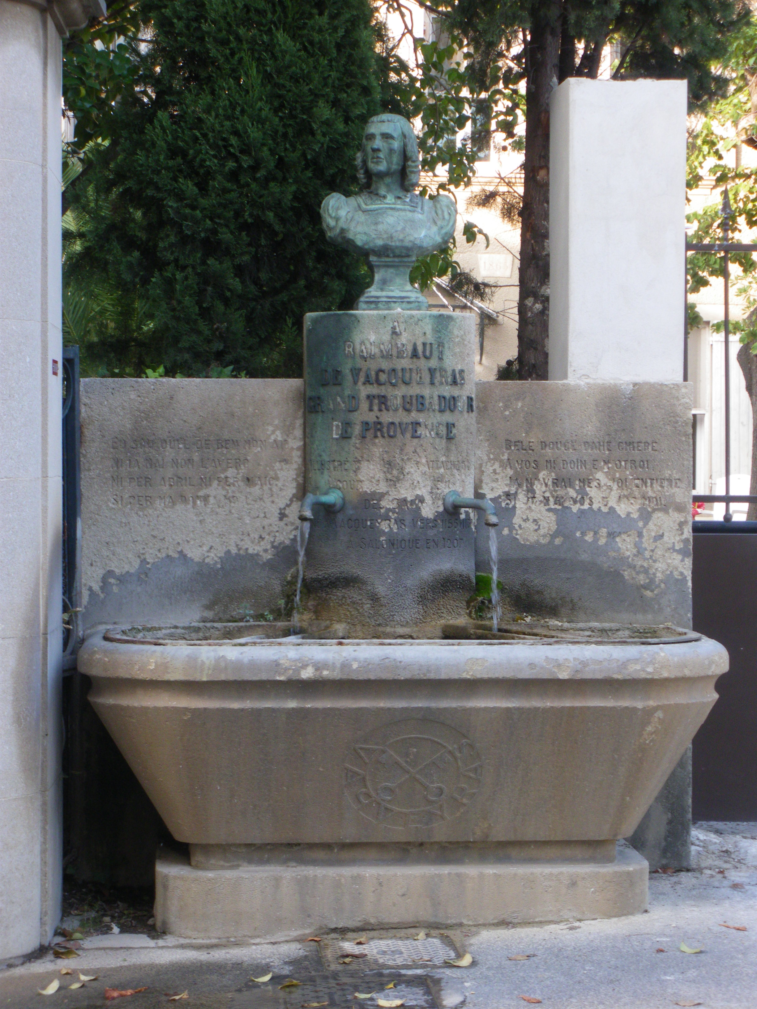 Fontaine Raimbault à Vacqueyras, Vaucluse